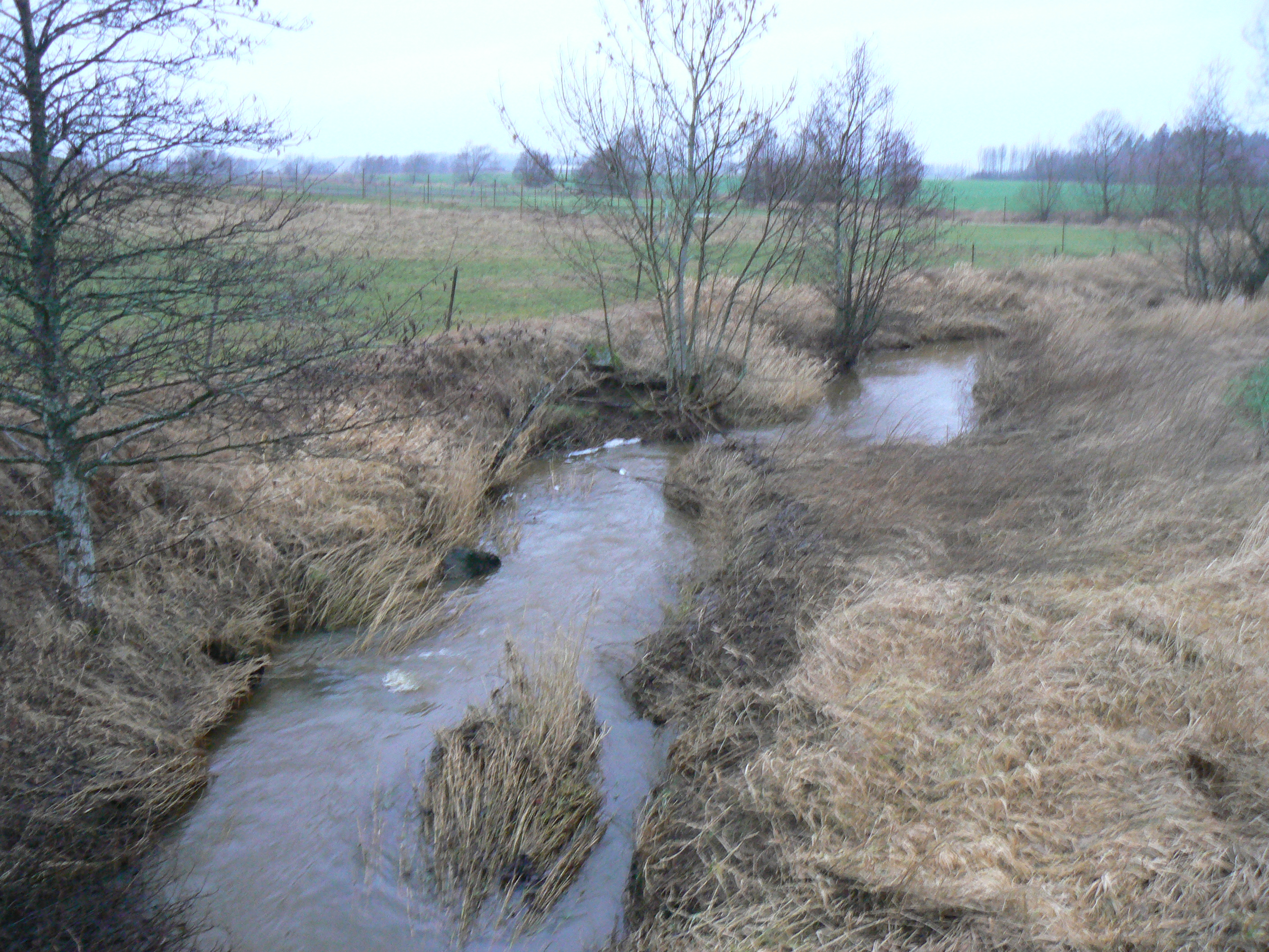 Slakaån (Slaka river) at Naterstad. Photo by Skvattram 2007-01-16.